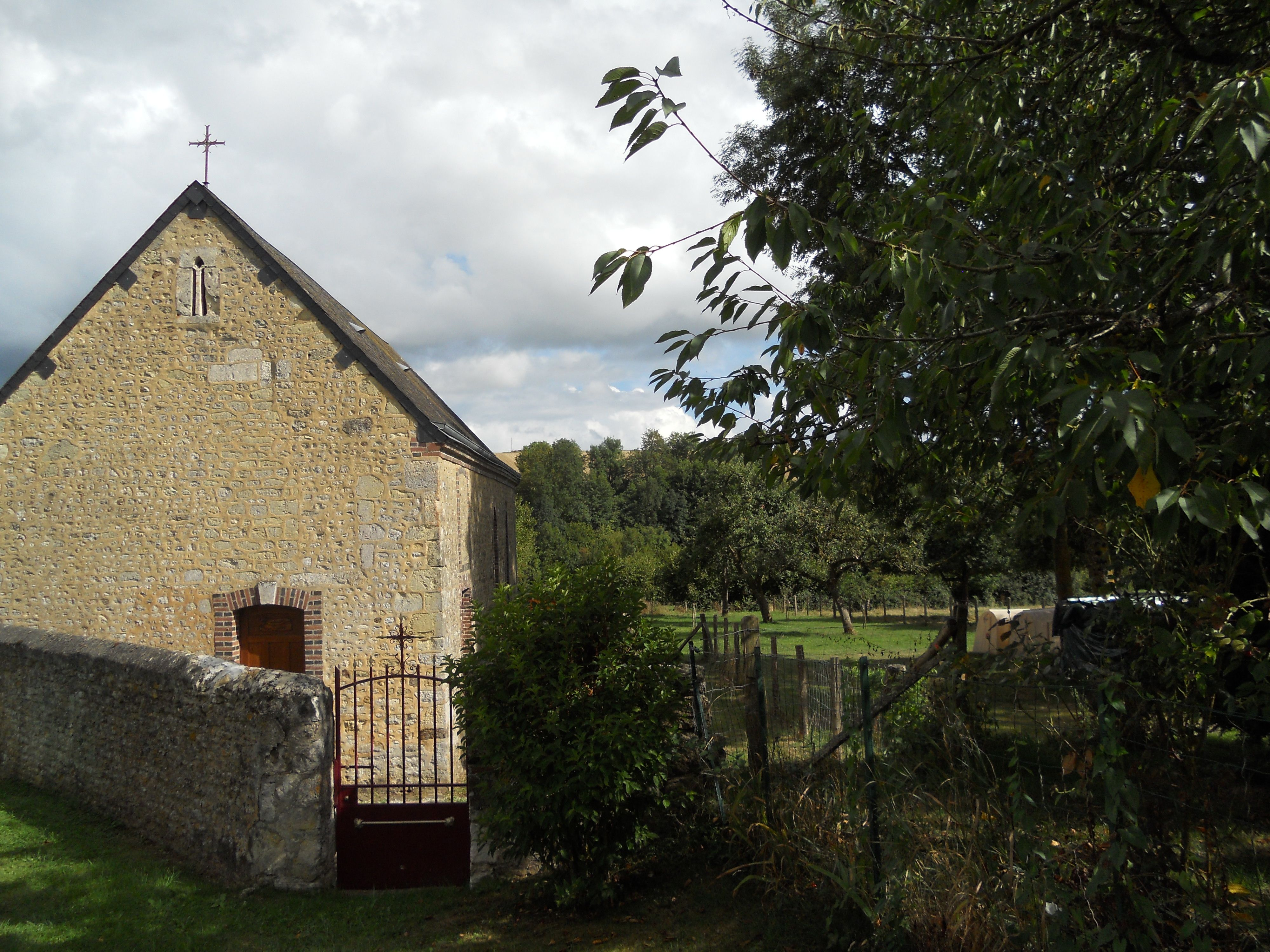 La chapelle Saint-Marcel, hameau de St Marcel, commune de Sainte-Céronne-lès-Mortagne